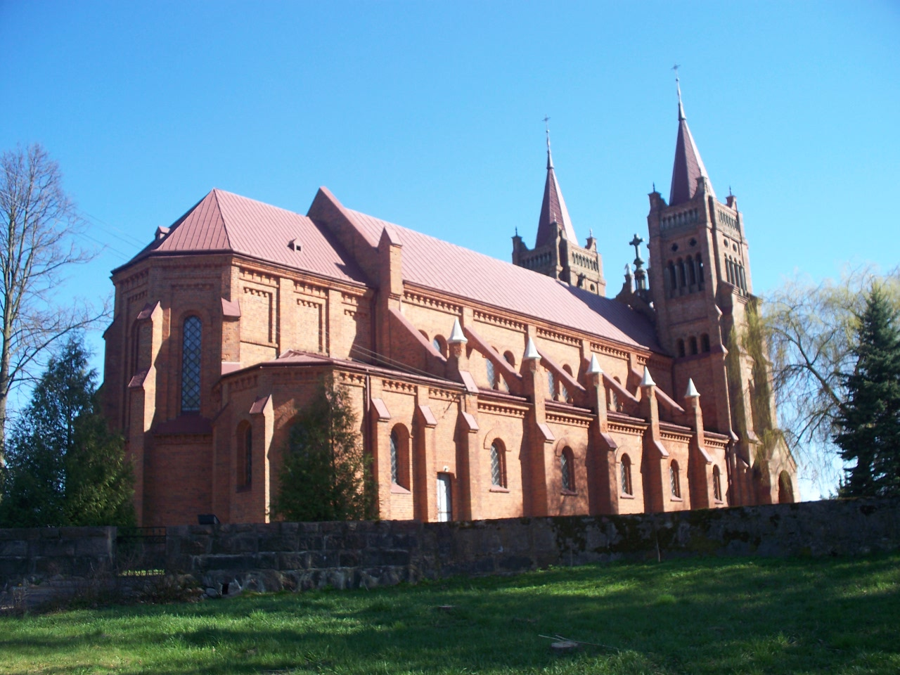 W latach 1883 –1889 z fundacji parafian i Stanisława Kierznowskiego zbudowano kościół w Dąbrowie Wielkiej pw. św. Stanisława BM, wg projektu arch. Józefa Piusa Dziekońskiego i Stanisława Kucharzewskiego. 1944 r. w skutek wysadzenia wież zniszczono fasadę i pd. przęsło nawy. Odbudowany 1947 –60 r. Fasada zwrócona na pd. Neogotycki kosciół z romańskim detalem architektonicznym. (Kałamajska –Saeed M. Katalog Zabytków Sztuki Województwa Łomżyńskiego, Ciechanowiec, Zambrów, Wysokie Mazowieckie i okolice. Seria Nowa, Tom IX zeszyt 2. Polska Akademia Nauk i Instytut Sztuki, Warszawa 1986 r. s. 31.)